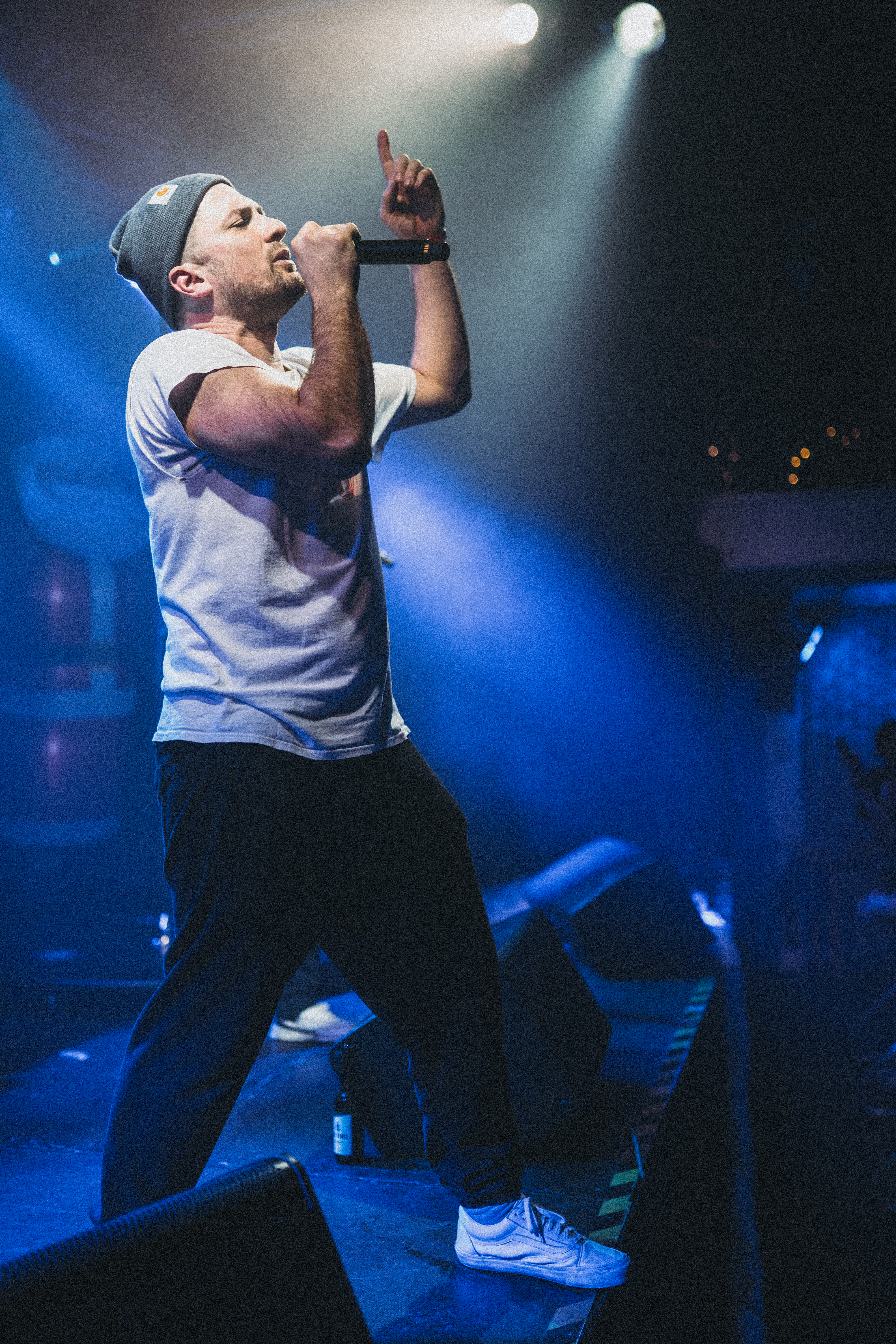 Live-Auftritt von Rhymin Simon